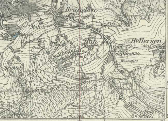 Topographische Karte 1921, Südosten von Lüdenscheid (Bräucken, Höh, Paulmannshöh, Bierbaum)